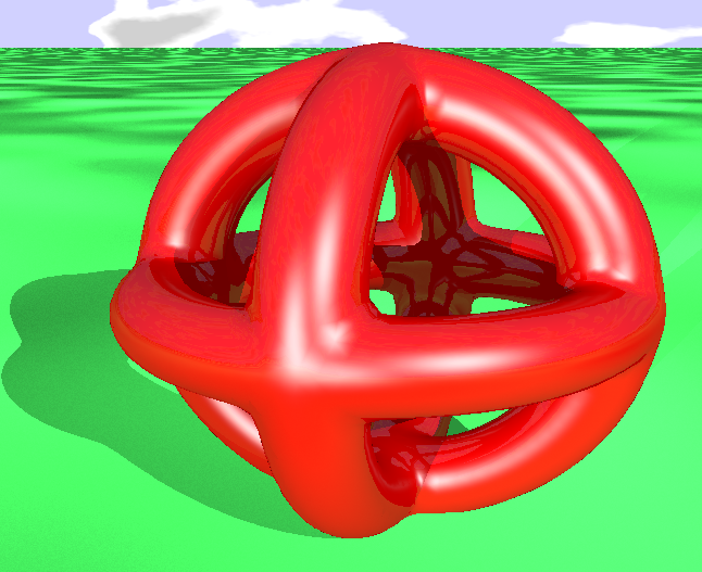 PovRay-Bild einer Approximation von 3 sich schneidenden Tori